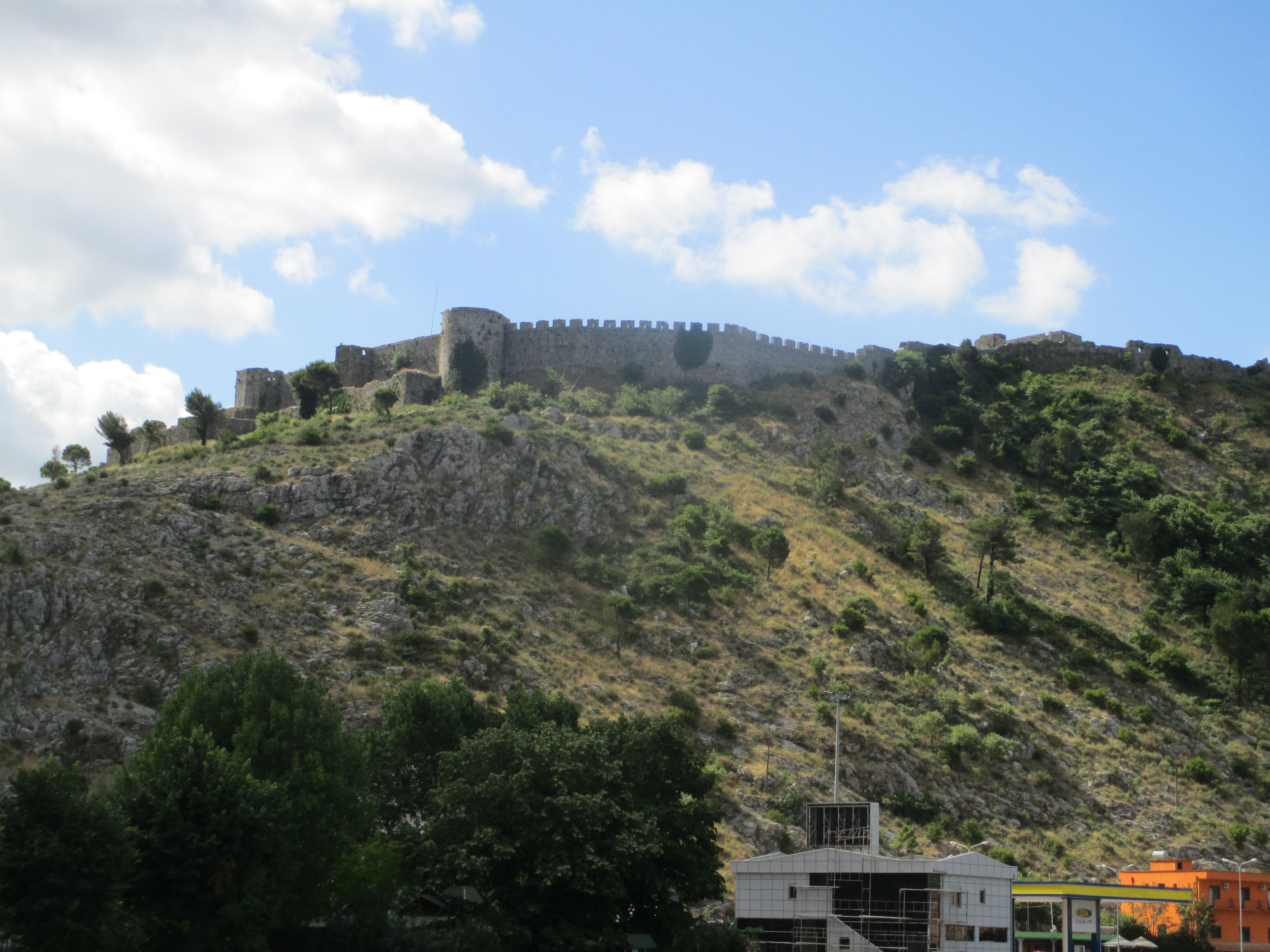 מבצר רוזפה (שקודר)